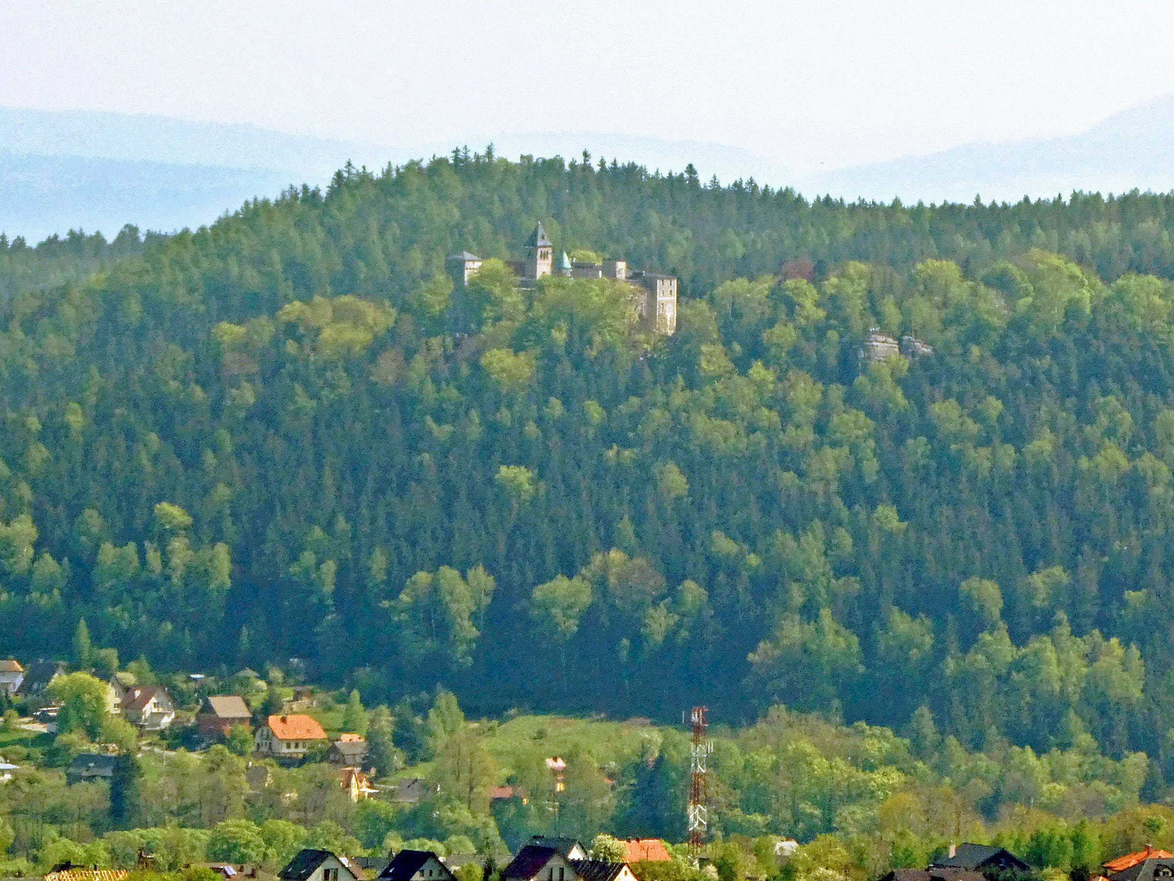 Die Lage der Burg Waldstein bei Rückers in der Grafschaft Glatz